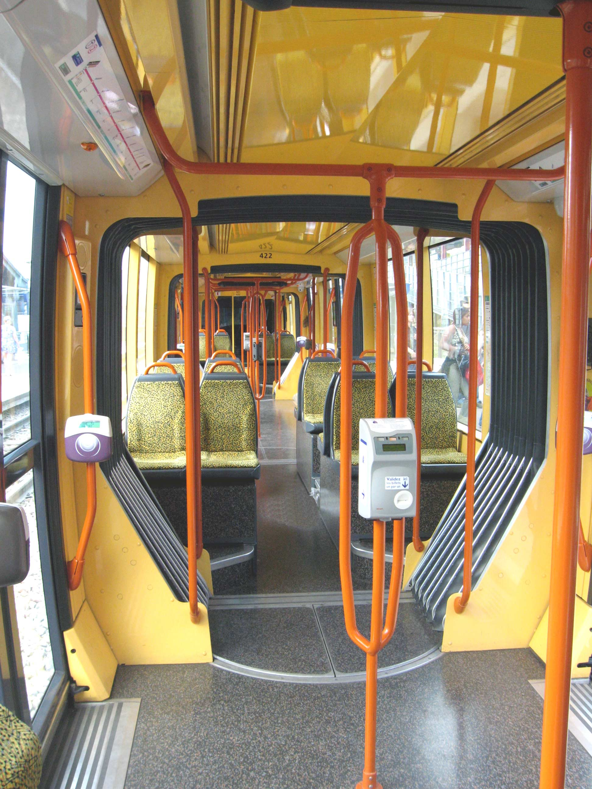 Description : Intérieur rame tramway ligne T2 Place : Issy, Paris, France Date : juin 2006 Author : Pline photo personnelle